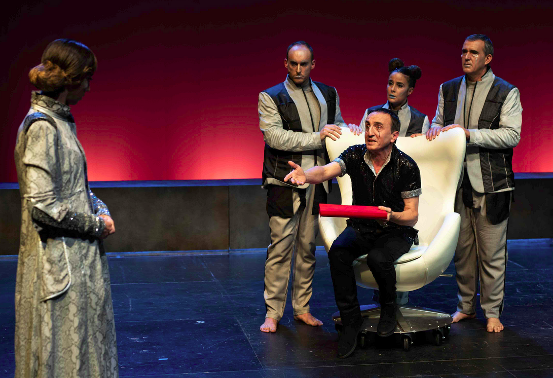 "Ghero. azken euskalduna" antzezlanaren eszena bat